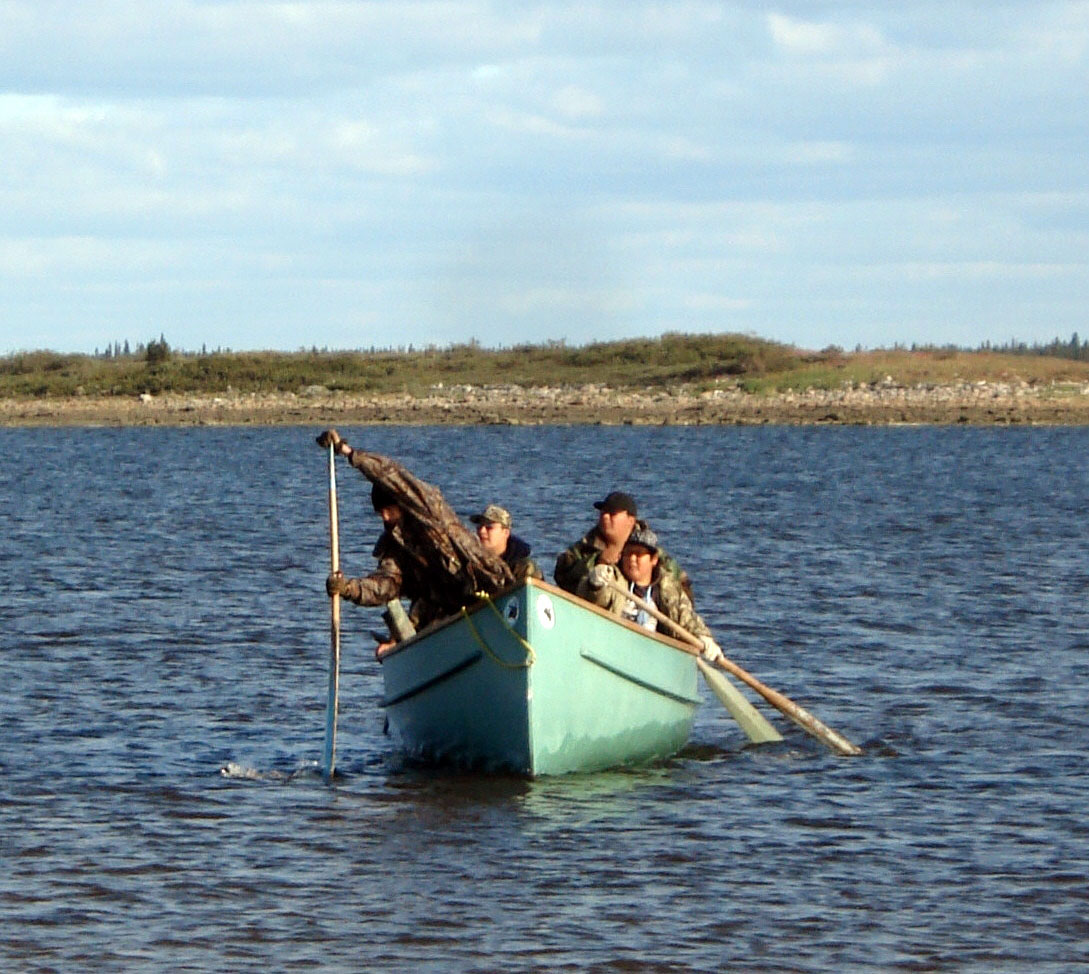 Cris de Chisasibi, à la Baie James, au Québec / Chisasibi Crees, at James Bay, Quebec